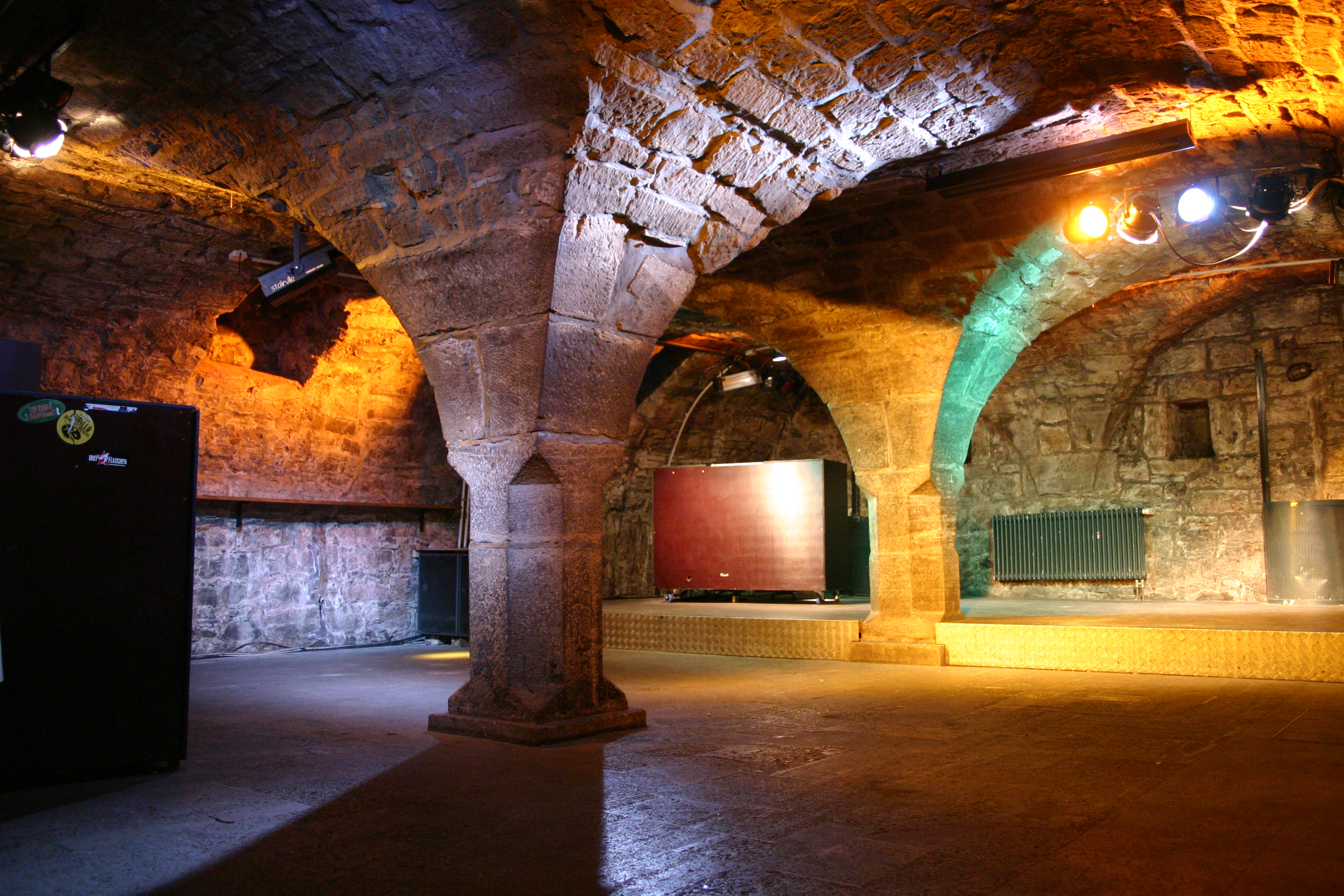 Veranstaltungsräume im Gewölbekeller der Engelsburg - Allerheiligenstraße, Erfurt, Thüringen, Deutschland